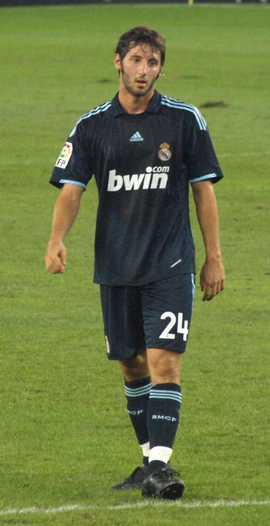 Esteban Granero en el partido que enfrentó al Real Madrid con el RCD Español en el Estadio de Cornellá-El Prat de la primera vuelta de La Liga 2009/10.